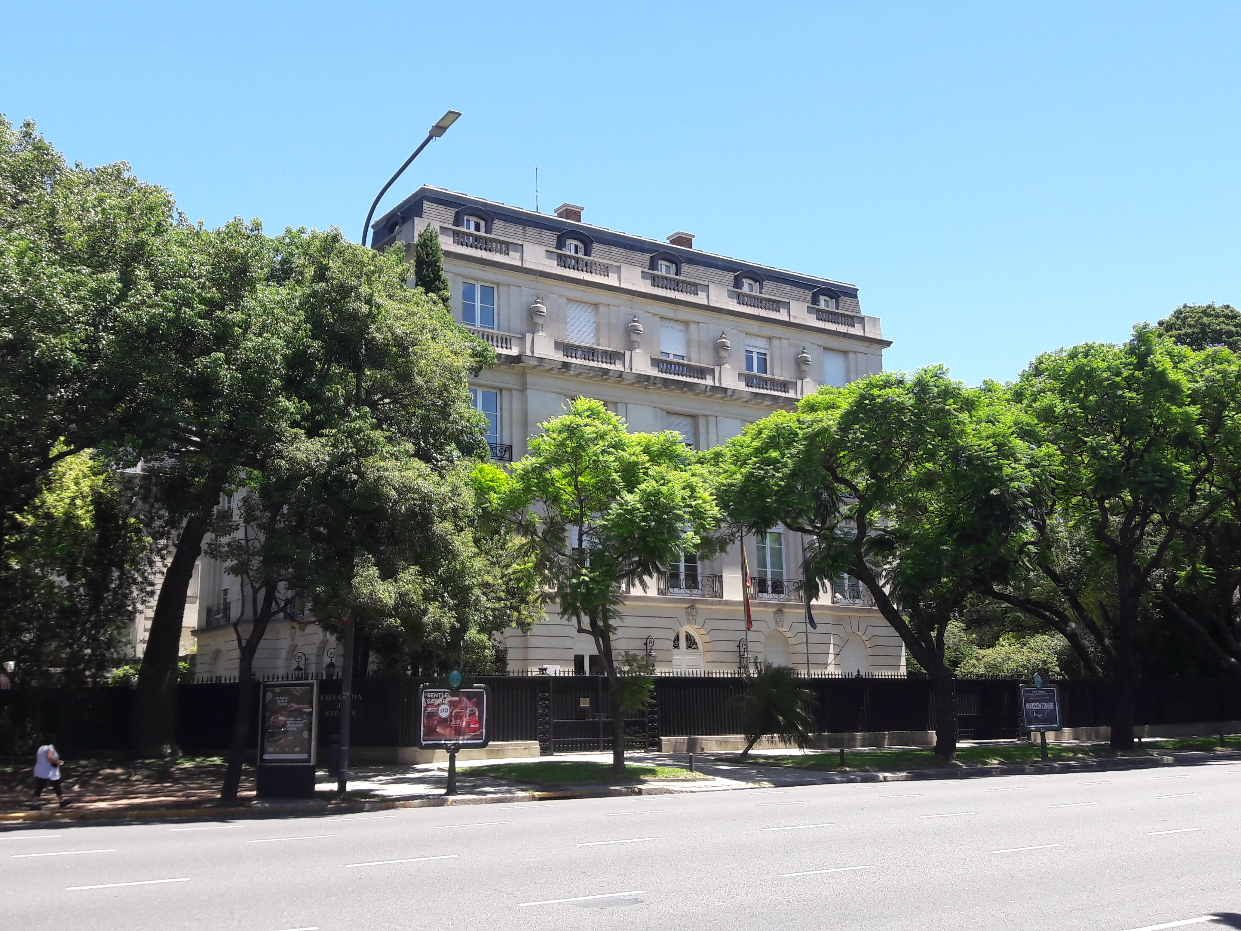 Embajada de España, Palermo, Buenos Aires, Argentina.